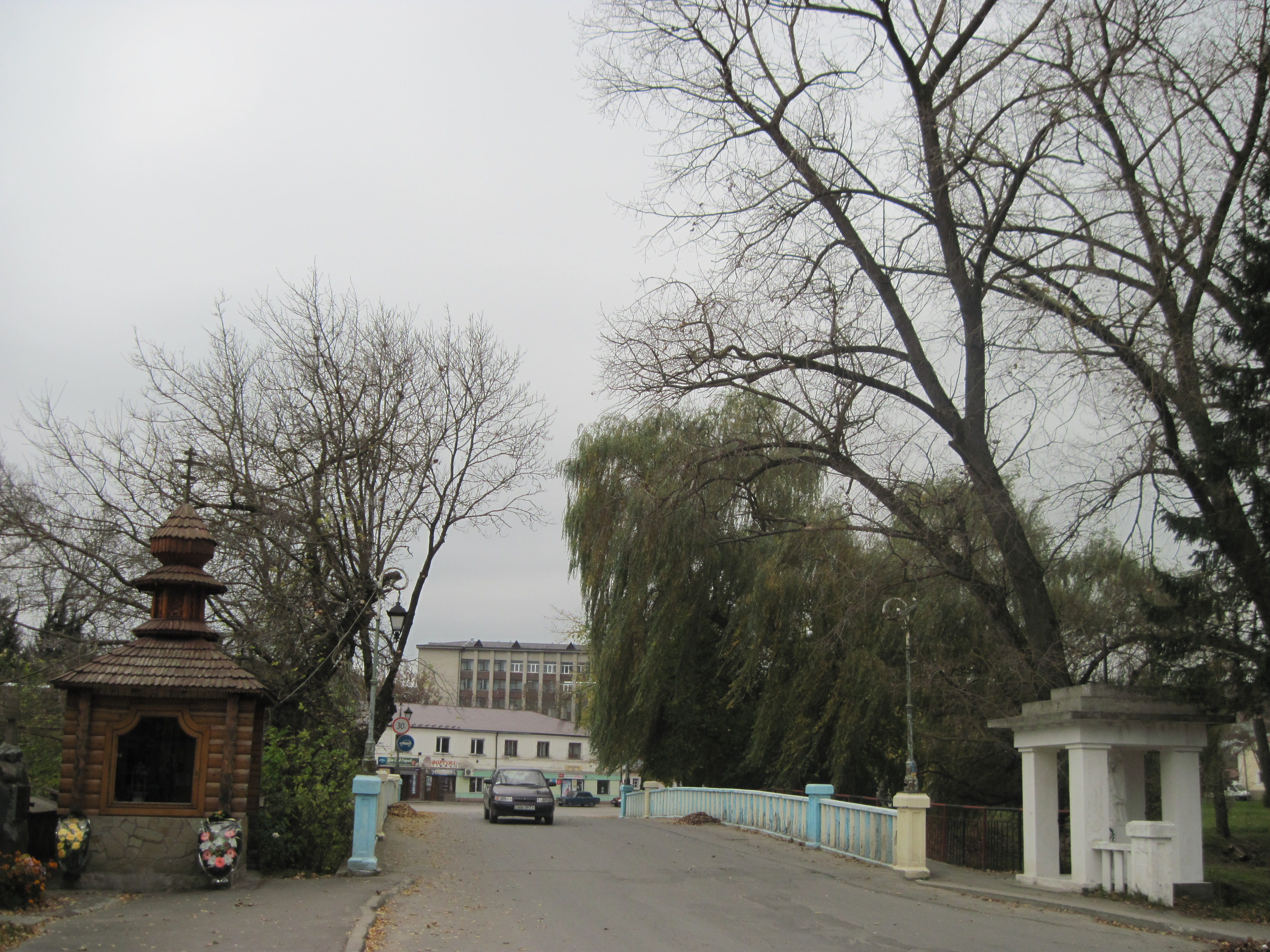 міст з каплицями, Збараж